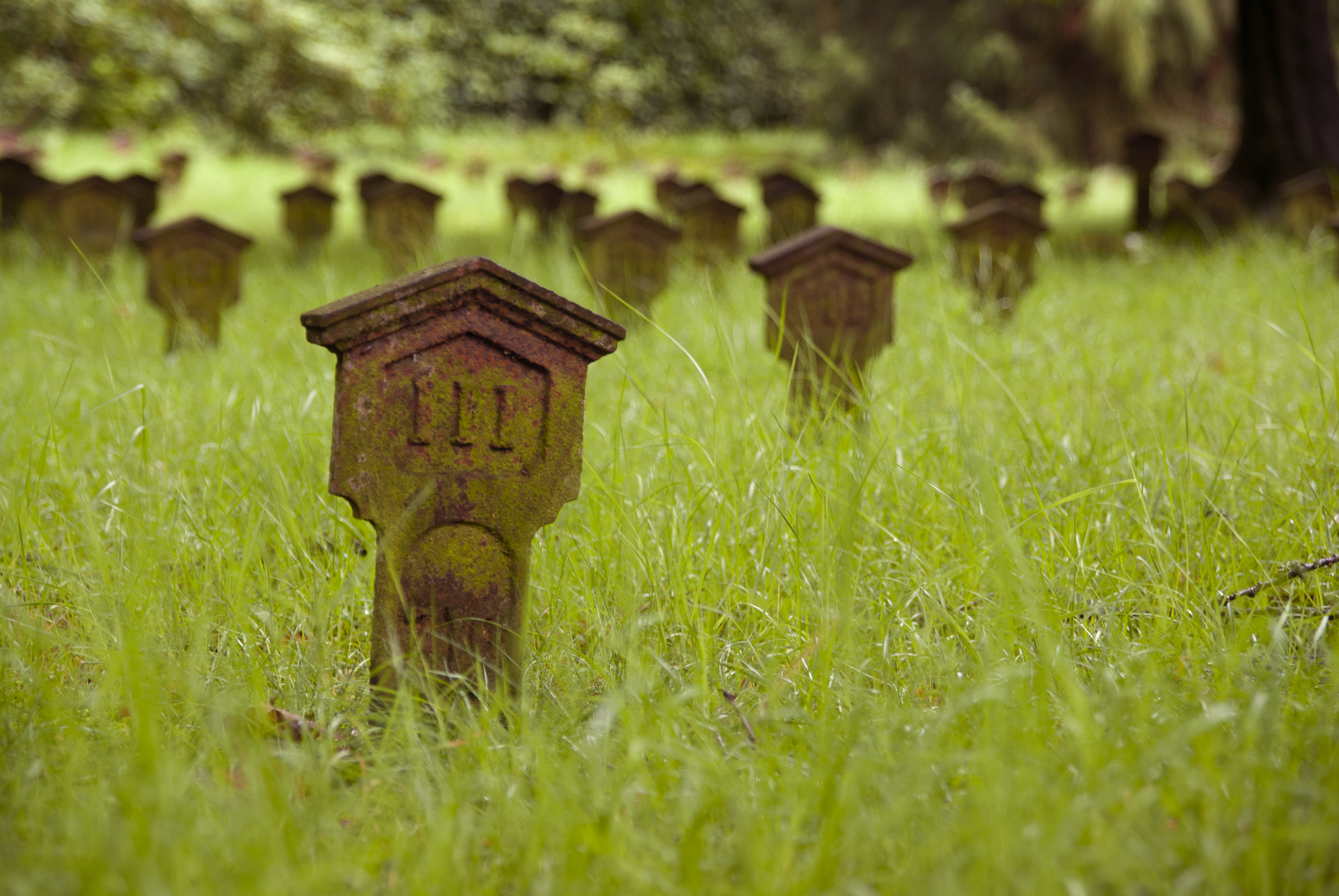 Gietijzeren grafmonument kinderen WO1 Eperweg 22 Nunspeet